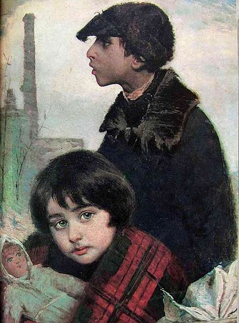 Дети-беженцы